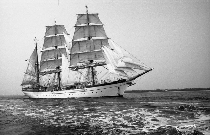 Das Segelschulschiff der Bundesmarine "Gorch Fock" verlässt zur 48/49 Auslandsausbildung den Kieler Hafen